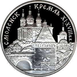 Монета Банка России — Серия: «Памятники архитектуры России», Смоленский Кремль, XI—XVIII вв., 3 рубля, реверс.